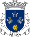 Brasão da Freguesia de Sebal.